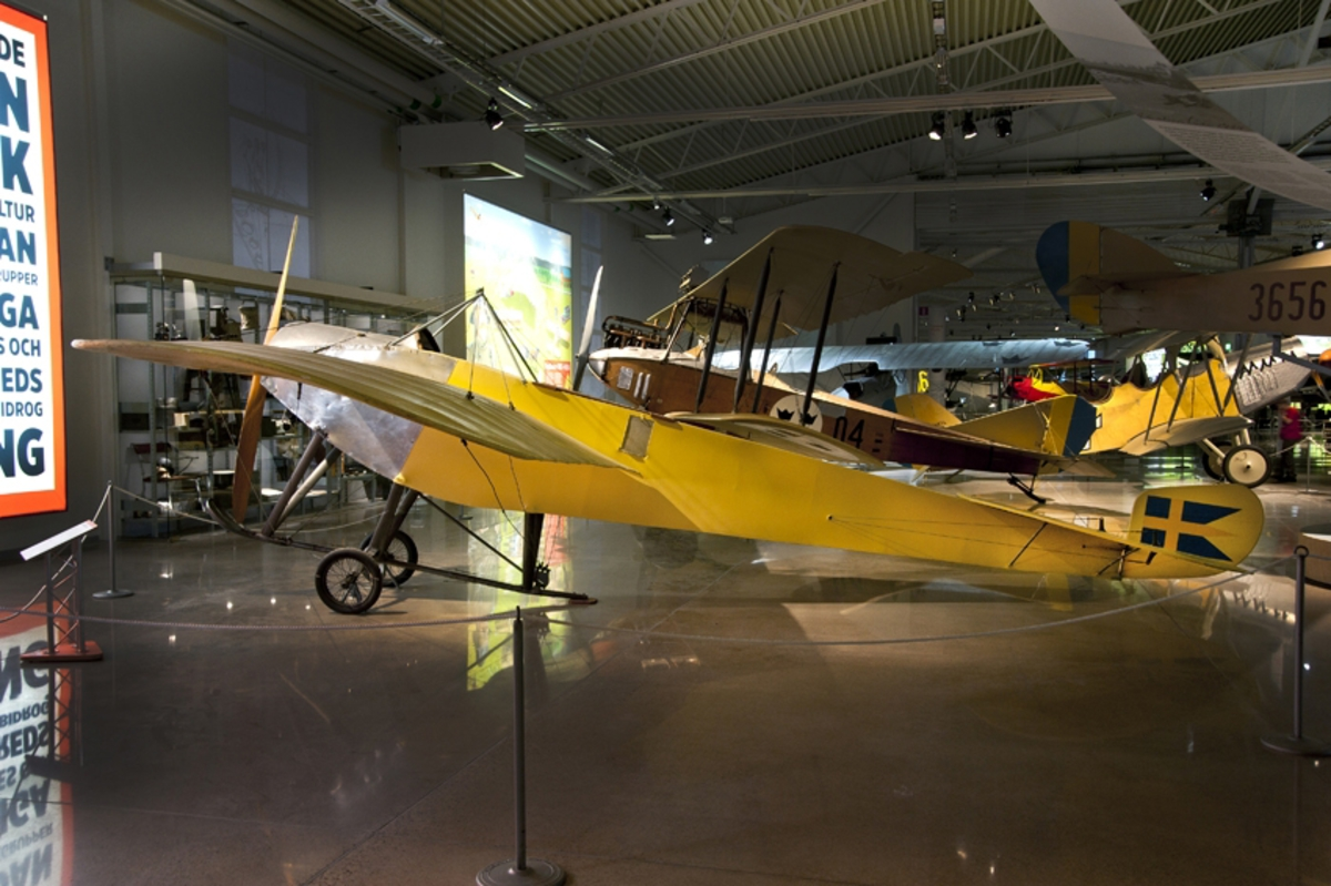 Flygplan M1 Nieuport, IV-G Monoplanet (nr: 1). Ensitsigt spaningsflygplan med en roterande Gnome-motor.